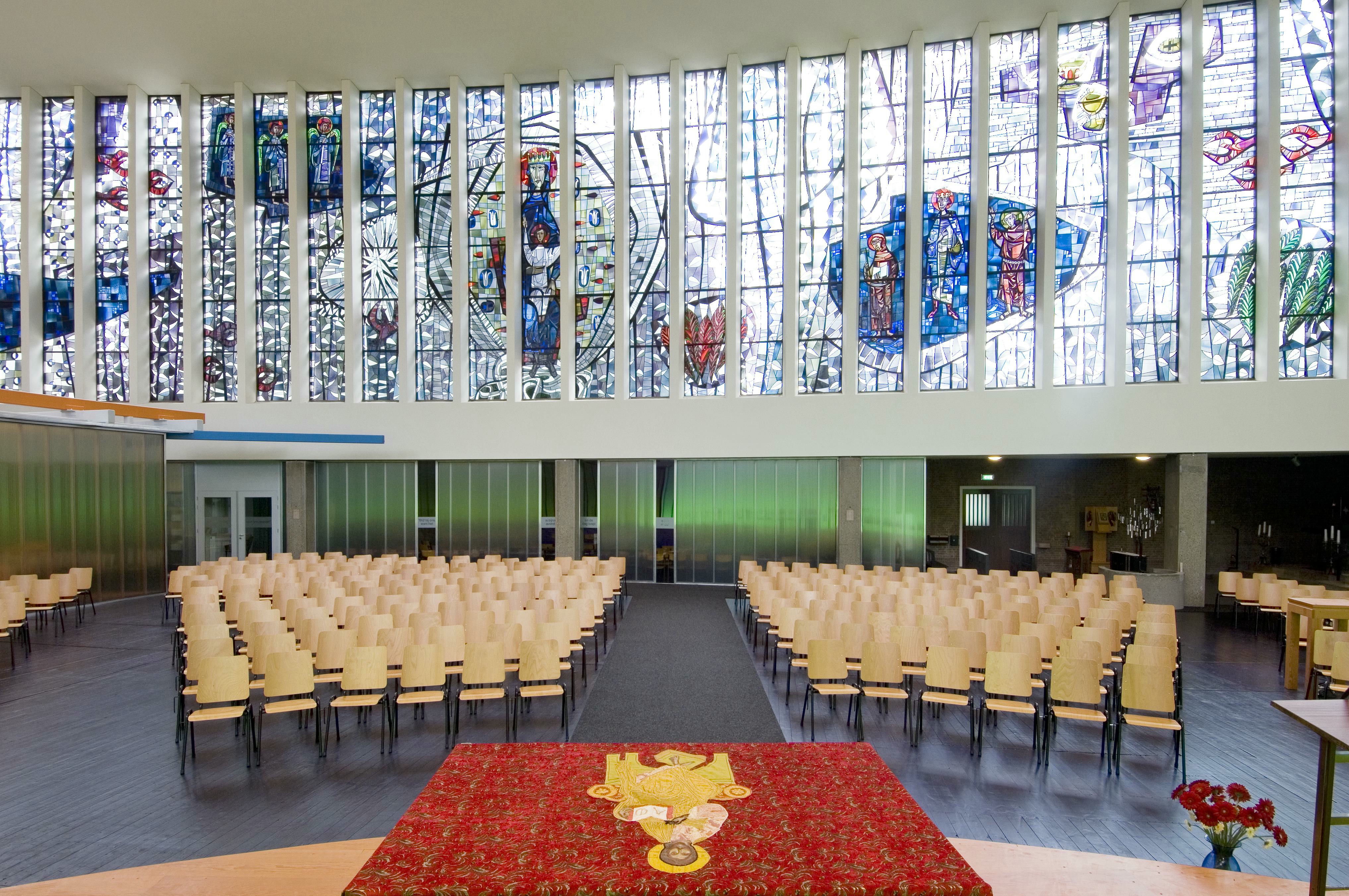 Rooms-katholieke Heiligen Antonius- en Lodewijkkerk: Interieur, kerkzaal met glas in loodramen (opmerking: Gefotografeerd voor Monumenten van Herrezen Nederland, bladzijde 88)